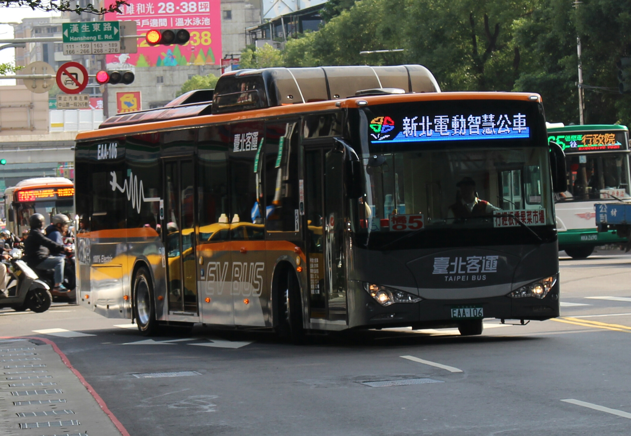 中文（台灣）: 臺北客運2018年凱勝綠能BYD K9純電動低地板公車EAA-106，行駛於新北市板橋區。